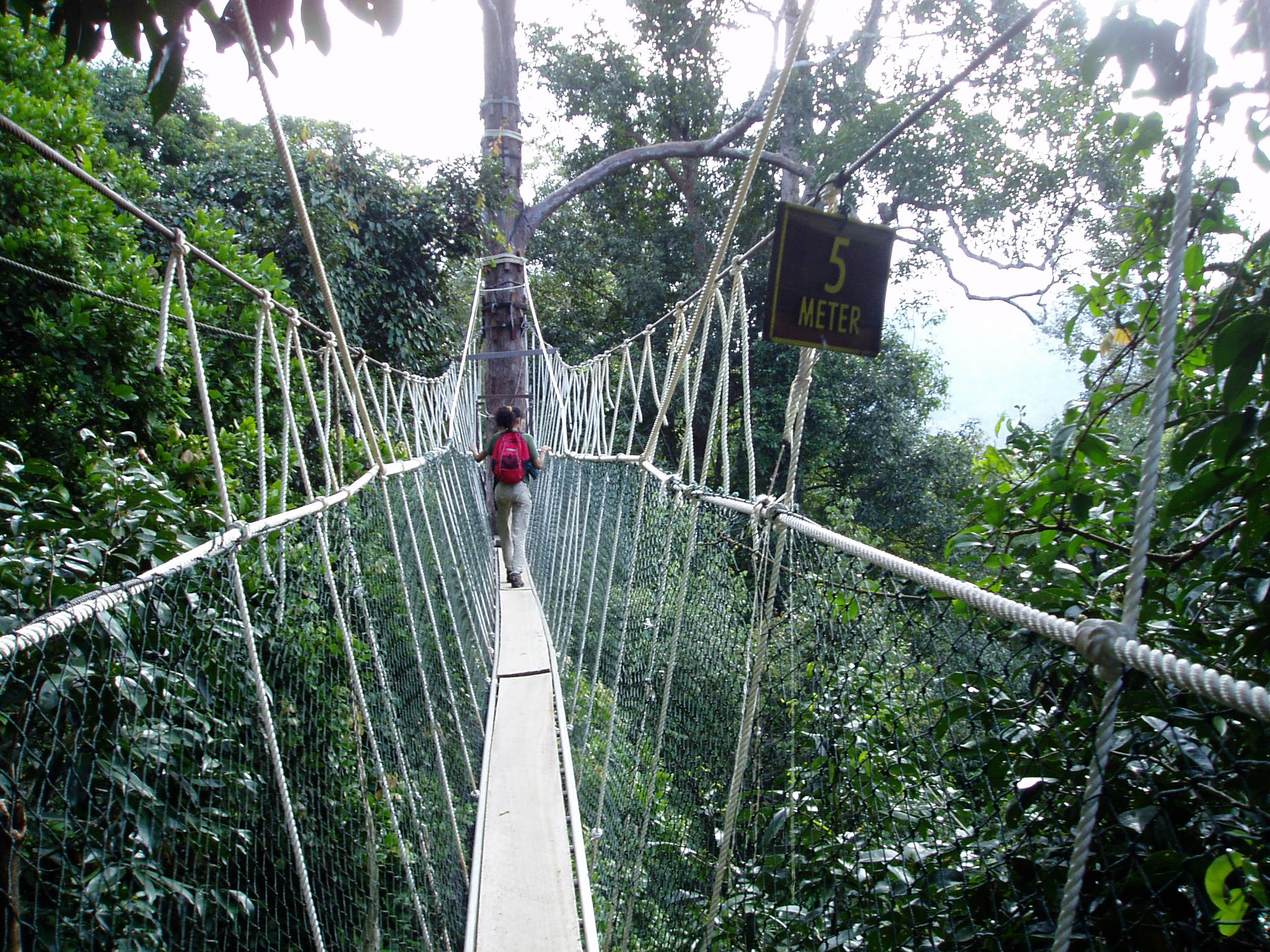 Canopy Walk in Malaysia.